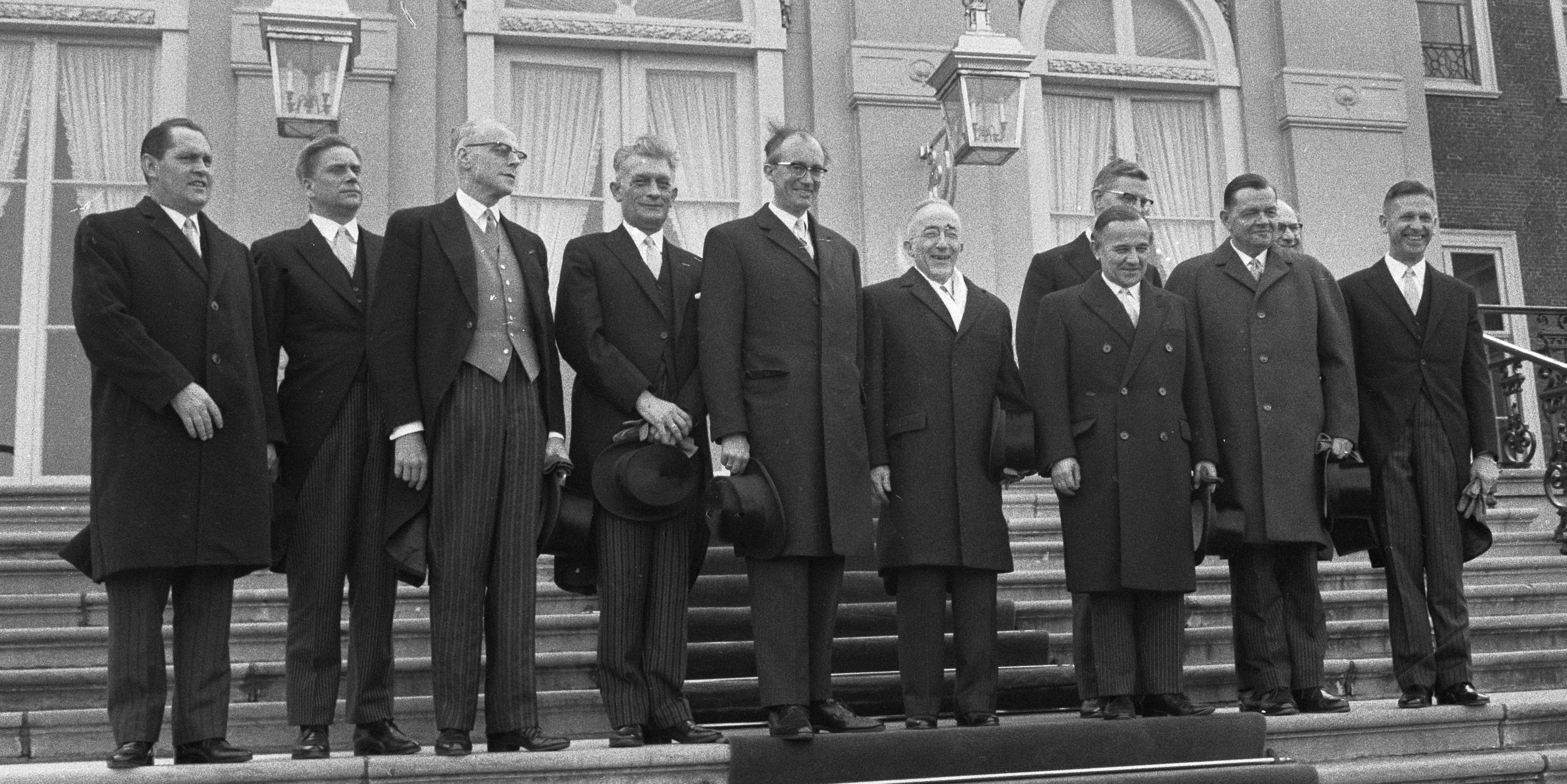 Kabinet De Jong (1967-1971) poseert op de trappen van Paleis Huis ten Bosch. V.l.n.r: Lardinois, Veringa, De Block, Roolvink, Witteveen, Polak, De Jong, Udink, Beernink, Schut, Den Toom. Den Haag, 5 april 1967.